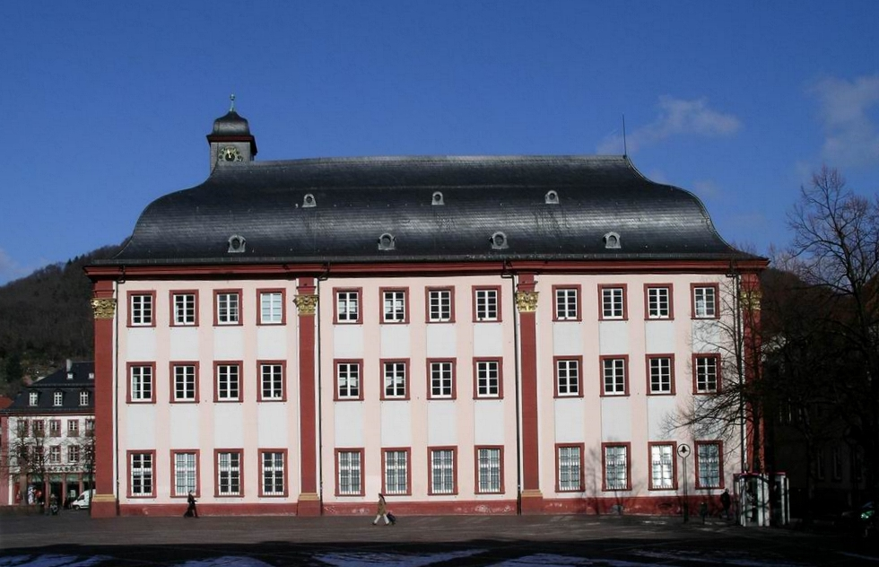 Domus Wihelmiana, die Alte Universität Heidelberg - heute Sitz des Rektorats